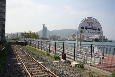 ノーフォーク広場駅